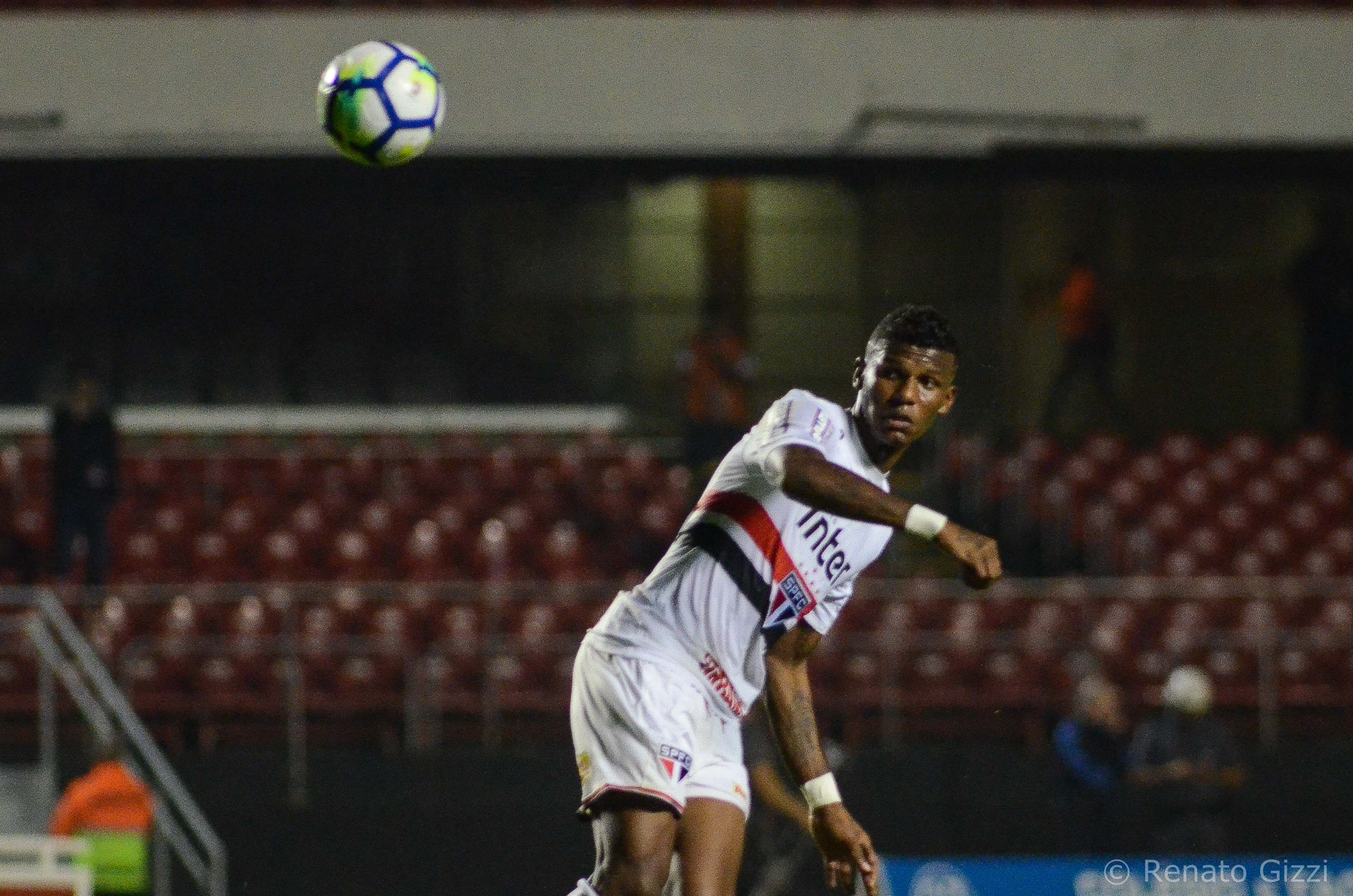 Arboleda em partida do São Paulo de 2018